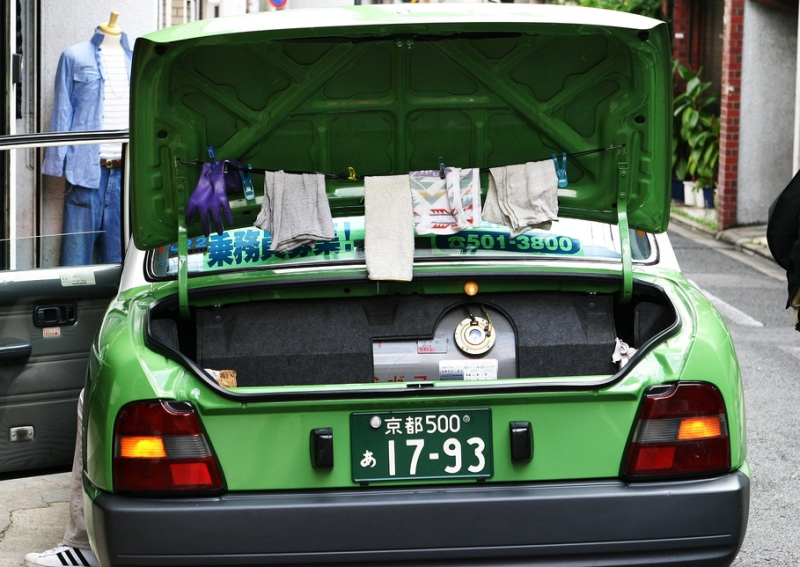 Japanese Taxi.